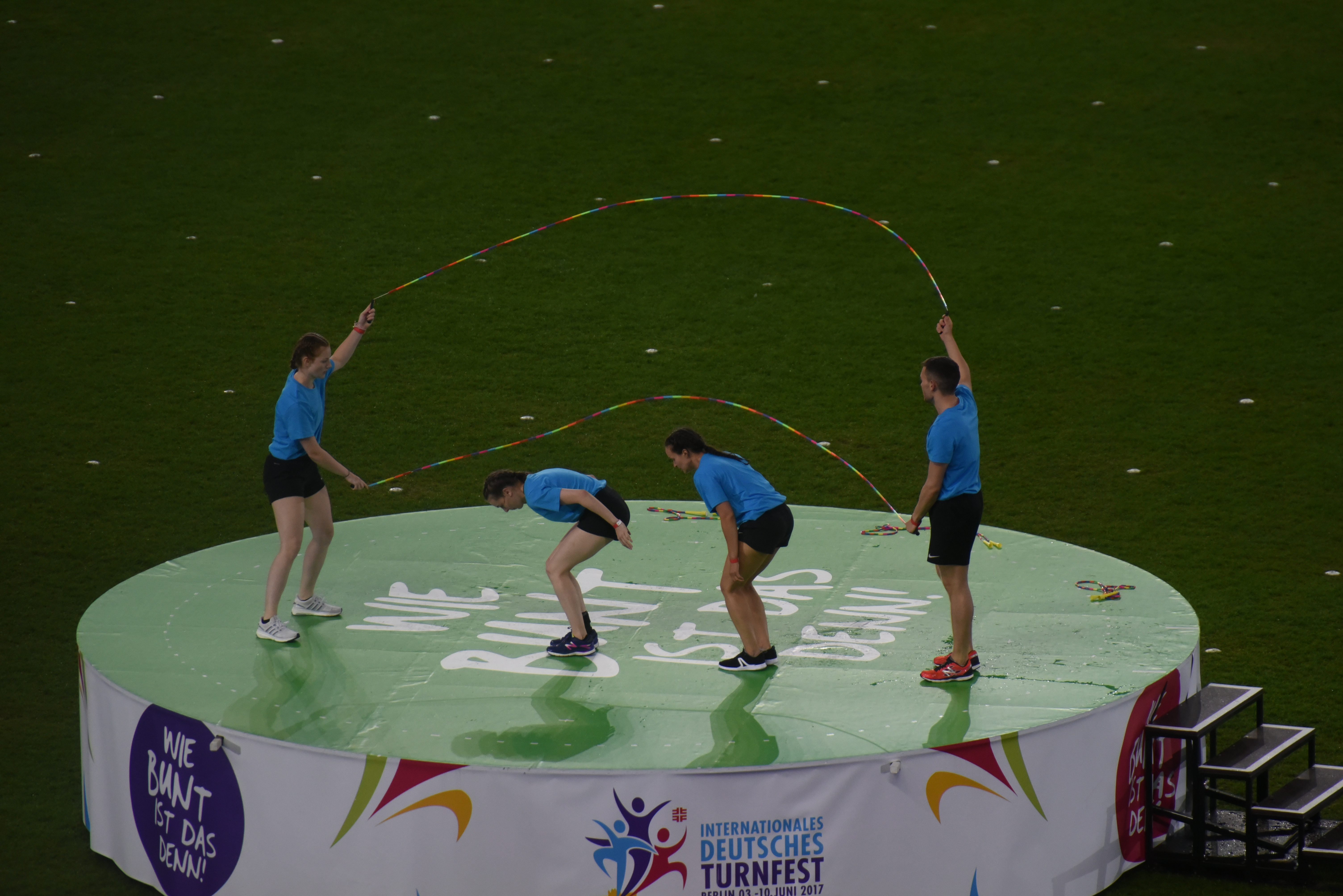 Stadiongala beim Internationalen Deutschen Turnfest Berlin 2017.